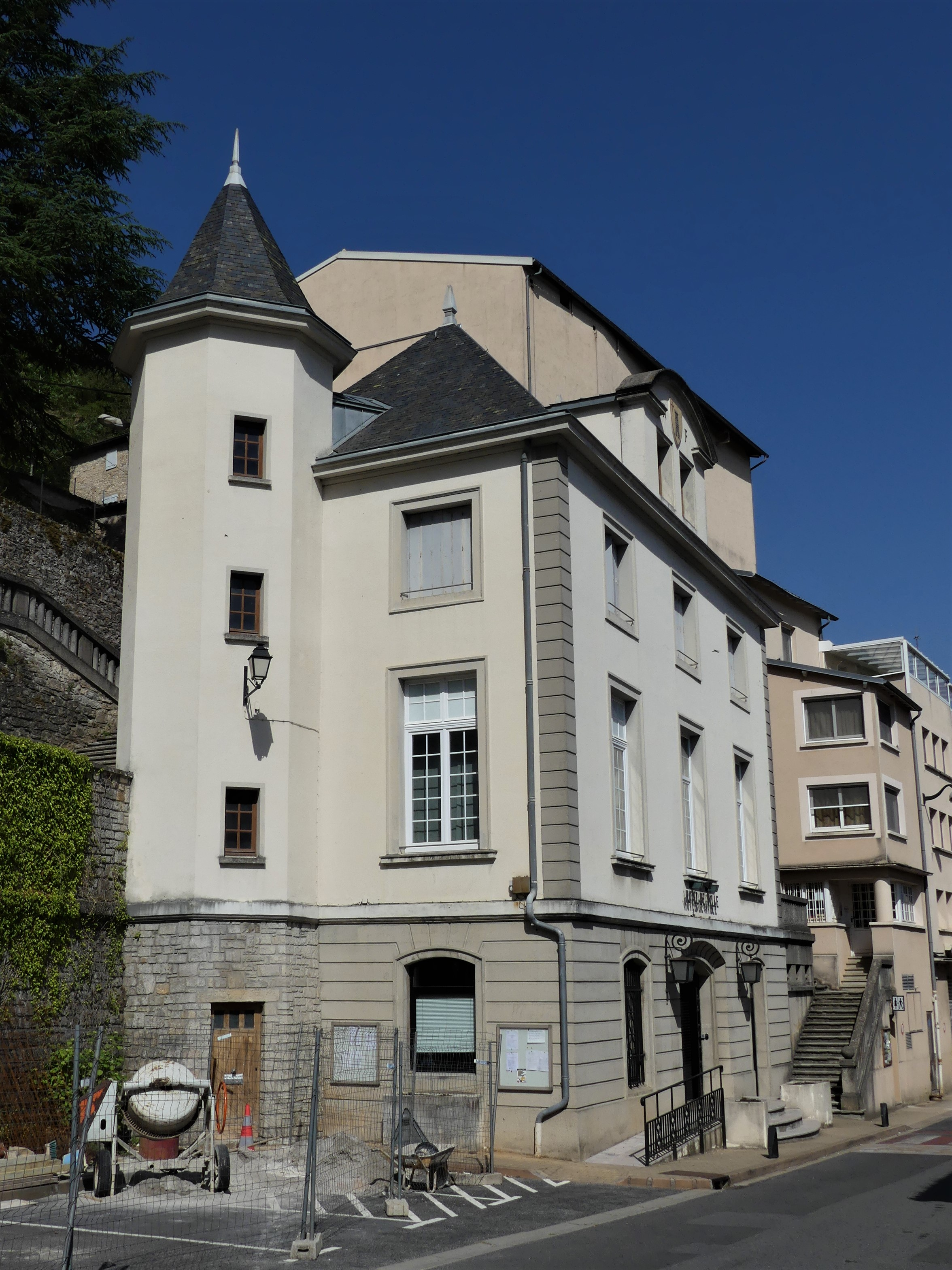 L'hôtel de ville de Roquefort-sur-Soulzon, Aveyron, France.